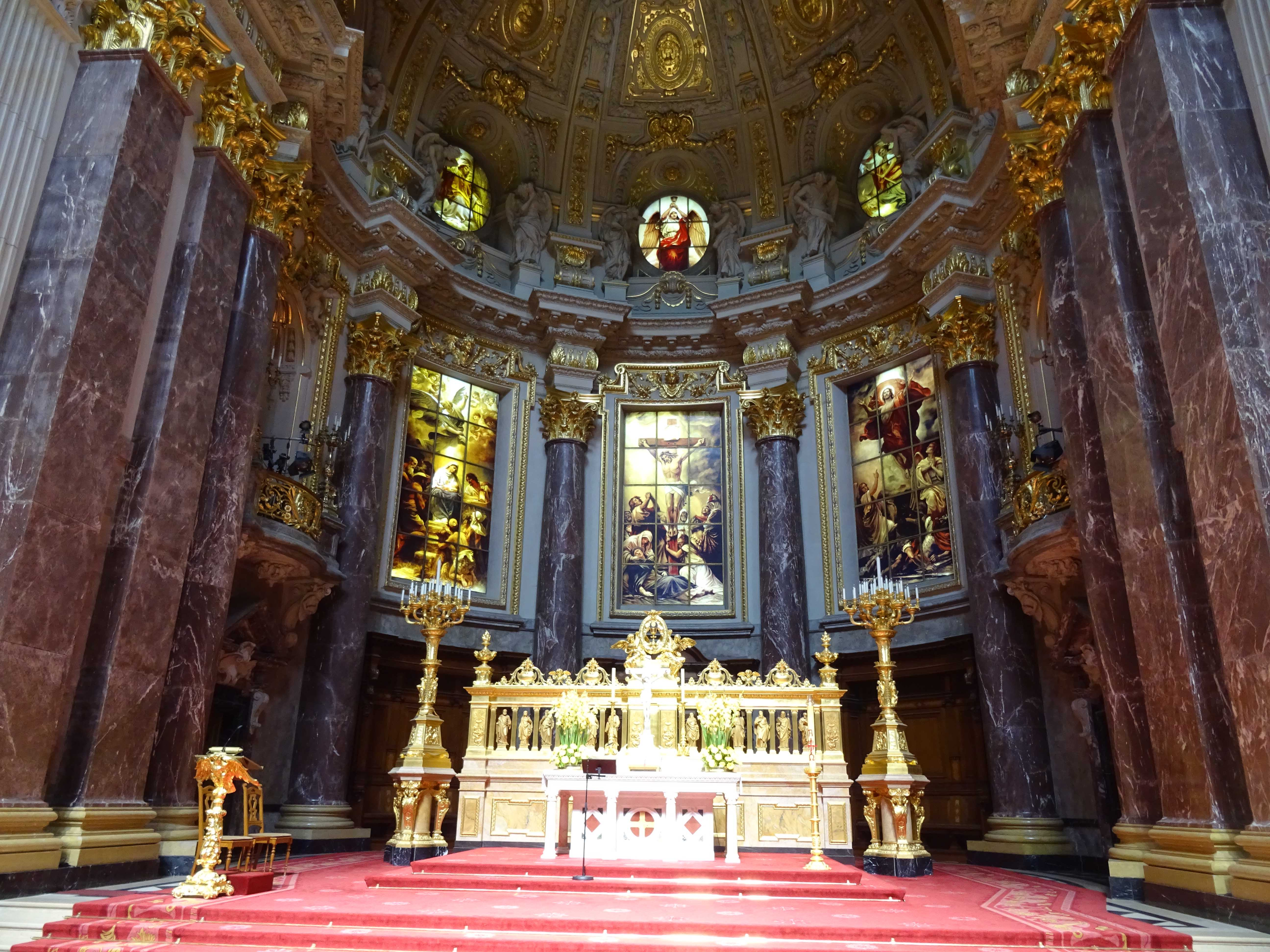 Berliner Dom, Altarraum: Die Säulen und Pilaster bestehen aus Saalburg Königsrot einem dunkelroten Kalkstein mit weißen Klüften und Einschlüssen.